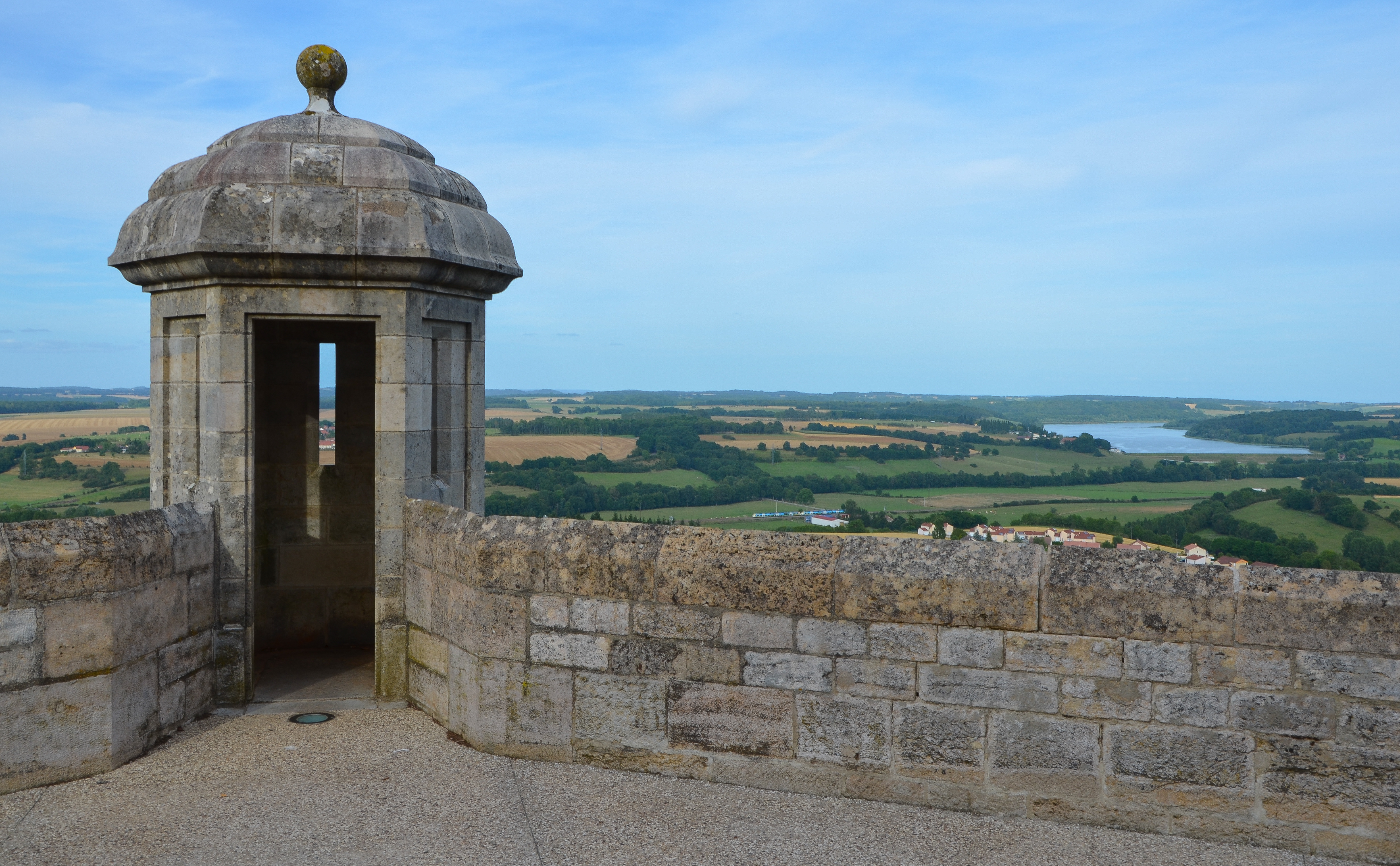 Remparts de Langres, Haute Marne, Champagne-Ardennes, France